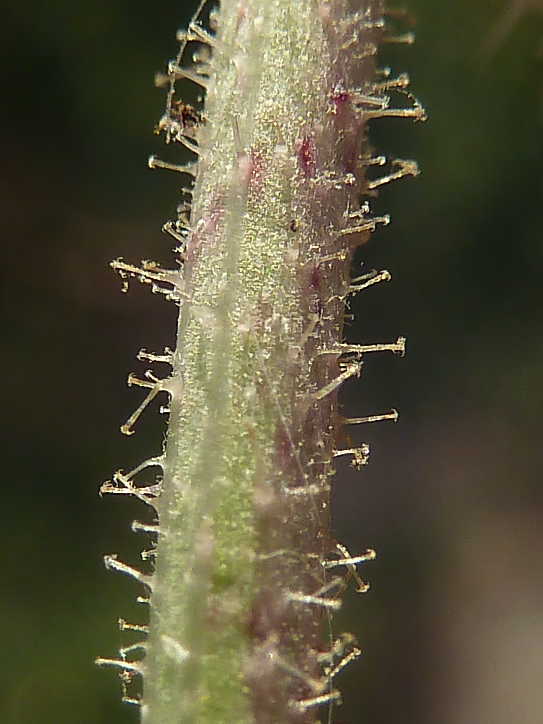 Helminthotheca echioides (raspasayo) - Tallo, detalle con pelos gloquidiados. - La Huerta, circa Biblioteca, Albatera, Provincia de Alicante, España).